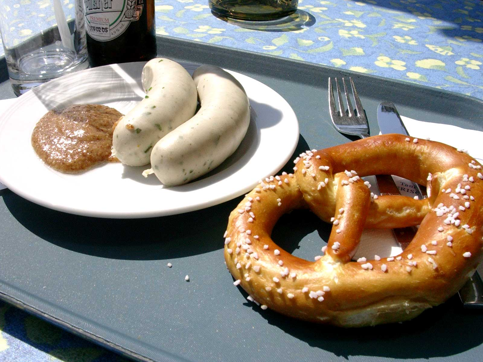 Weißwurst mit Bretzel uns süßem Senf